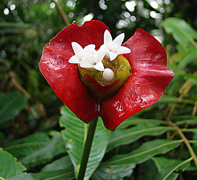 Native fro Mexico to Ecuador. Photo from Bosque del Paz, Costa Rica. In context at